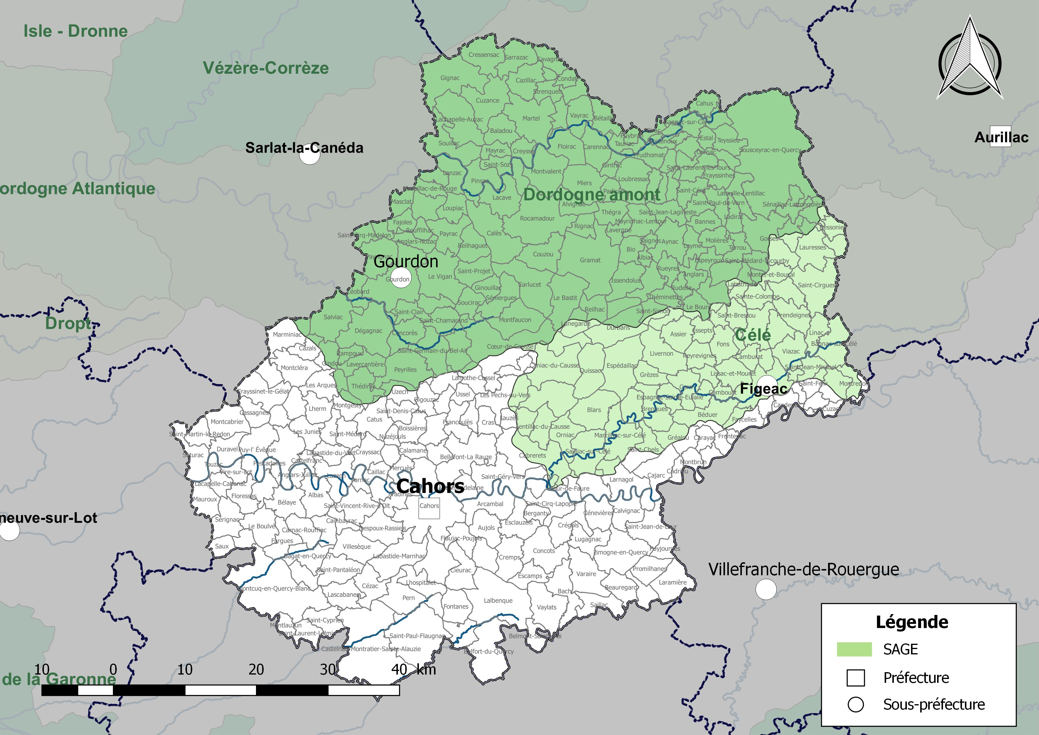 Carte des schémas d'aménagement et de gestion des eaux (SAGE) concernant le département du Lot (France) au 1er janvier 2018.